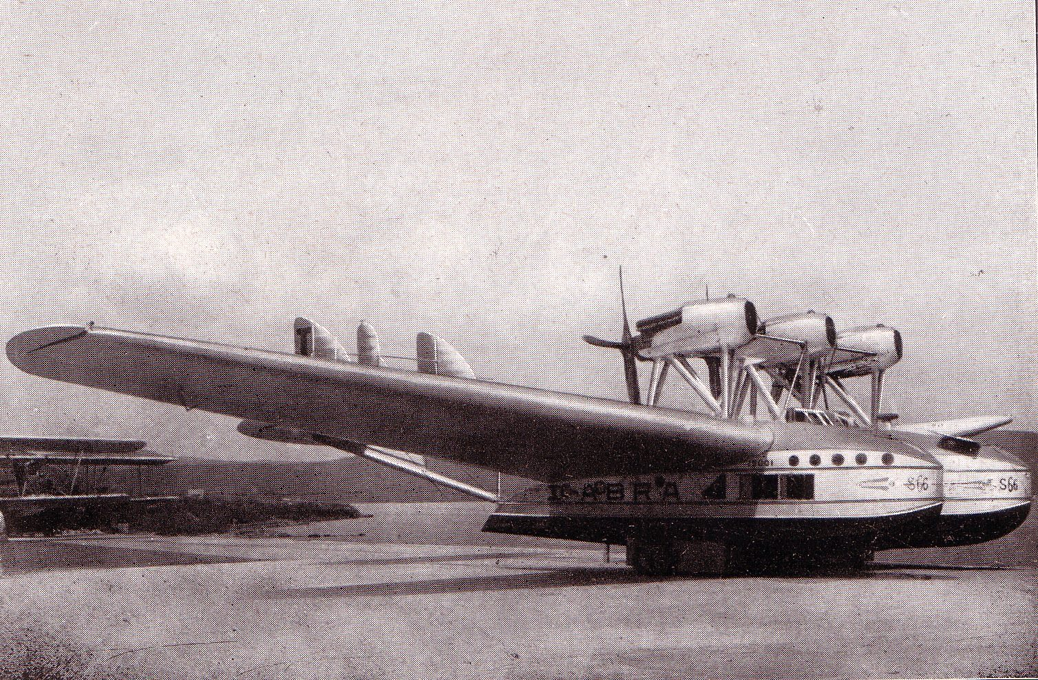 Savoia Marchetti S.66